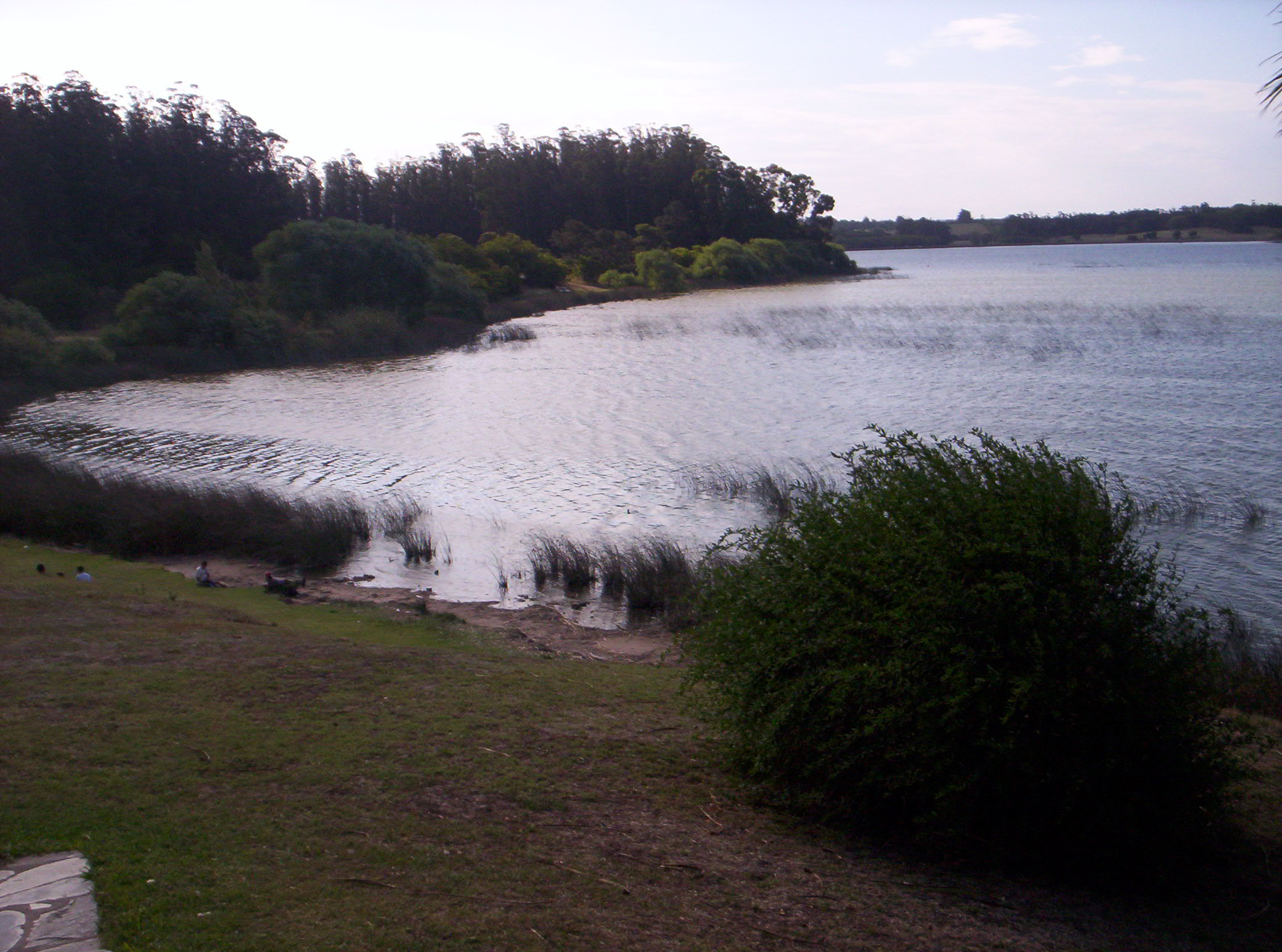 La laguna de los padres desde sus costas